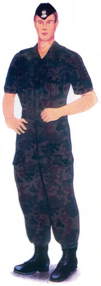 Ubiór polowy funkcjonariuszy noszących umundurowanie Sił Powietrznych z koszulą polową i spodniami polowymi oraz z furażerką